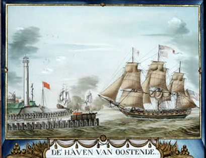 "De haven van Oostende, 1814", achterglasschilderij van de Oostendse schilder Wenzeslaus Wieden (1769-1814)